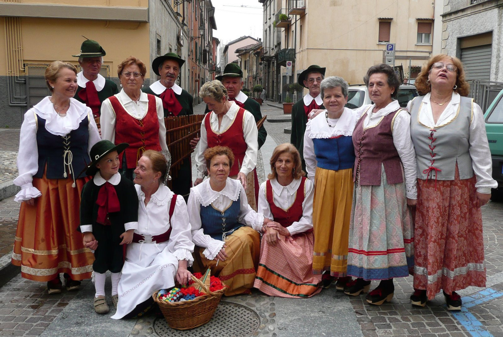 Foto d'insieme dei Gruppi Zabette e Firlinfeu